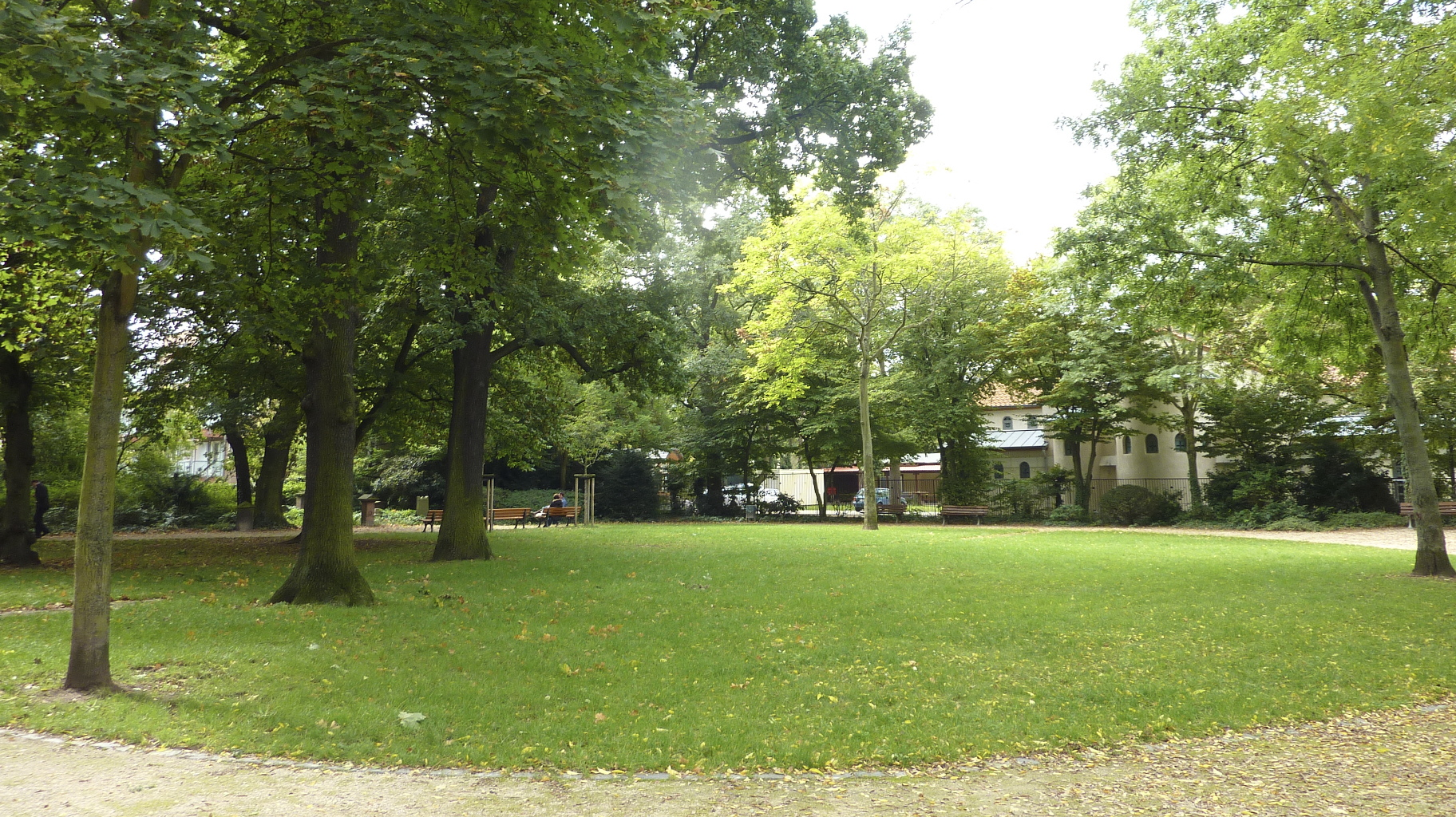 Frankfurt am Main, Stadtteil Bockenheim: Der Alte Friedhof Bockenheim ist ein von 1825 bis 1898 für Begräbnisse genutzter Friedhof, der im Jahr 1916 zu einer öffentlichen Grünanlage umgewidmet wurde. Das Foto zeigt die Wiese im nördlichen Teil des heutigen Parks, Ansicht von Nordosten. Rechts von der Bildmitte die auf dem Nachbargrundstück stehende griechisch-orthodoxe Kirche